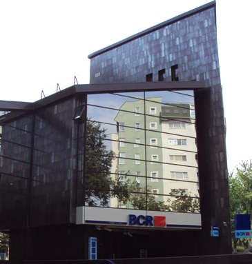 Imagine